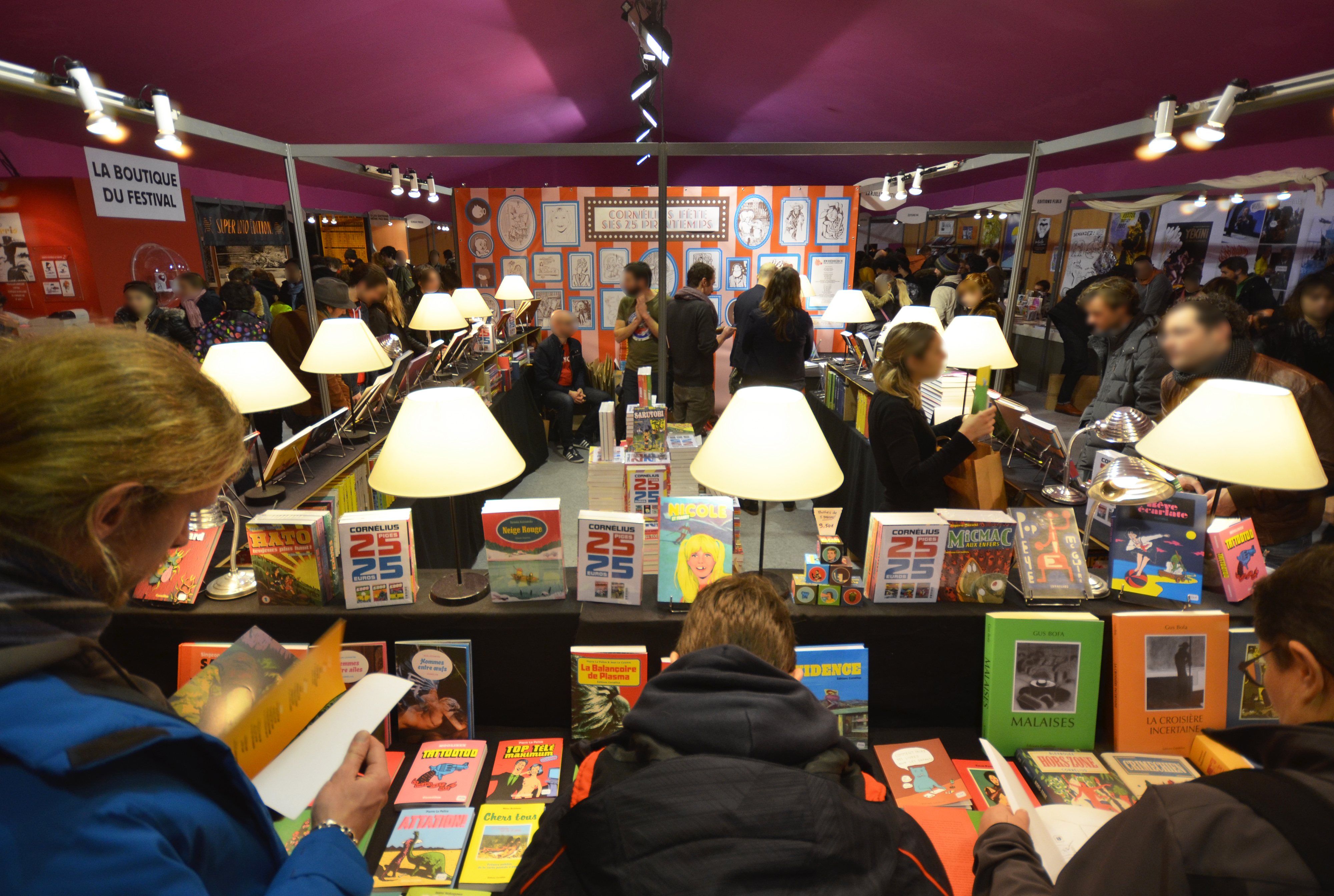 Le stand Cornélius dans le Nouveau Monde, Festival International de la Bande Dessinée d'Angoulême 2016.